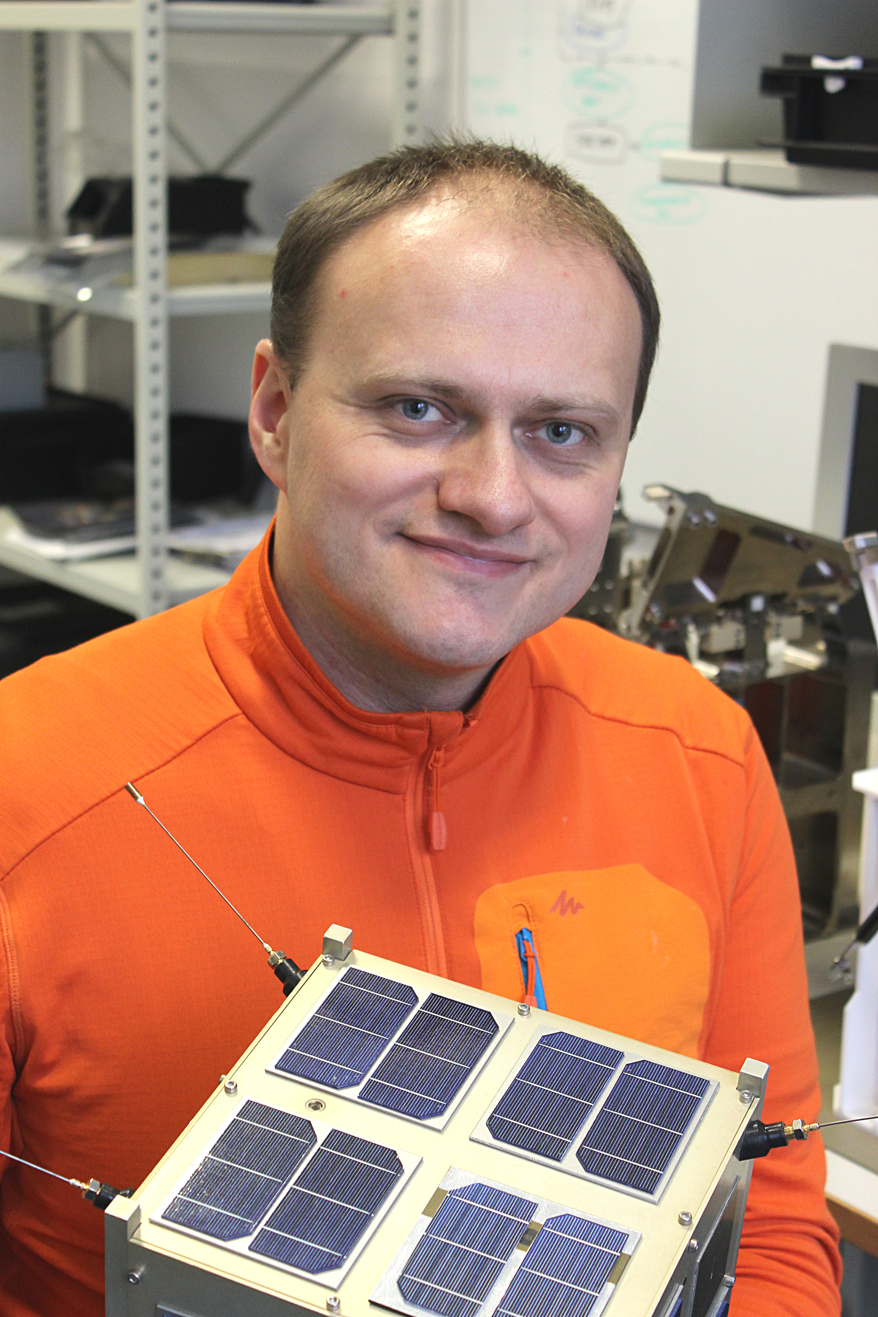 Marcin Stolarski